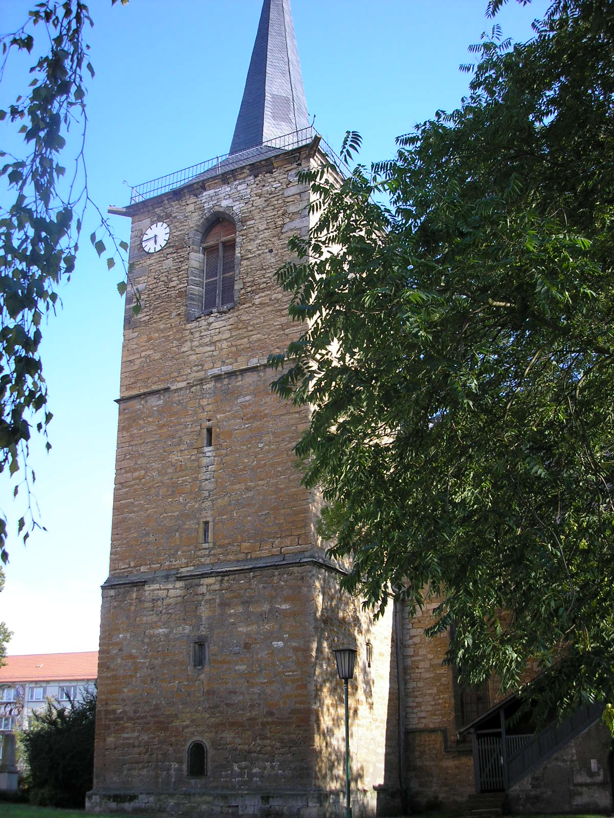 Turm der Stadtkirche von Sömmerda (Thüringen).